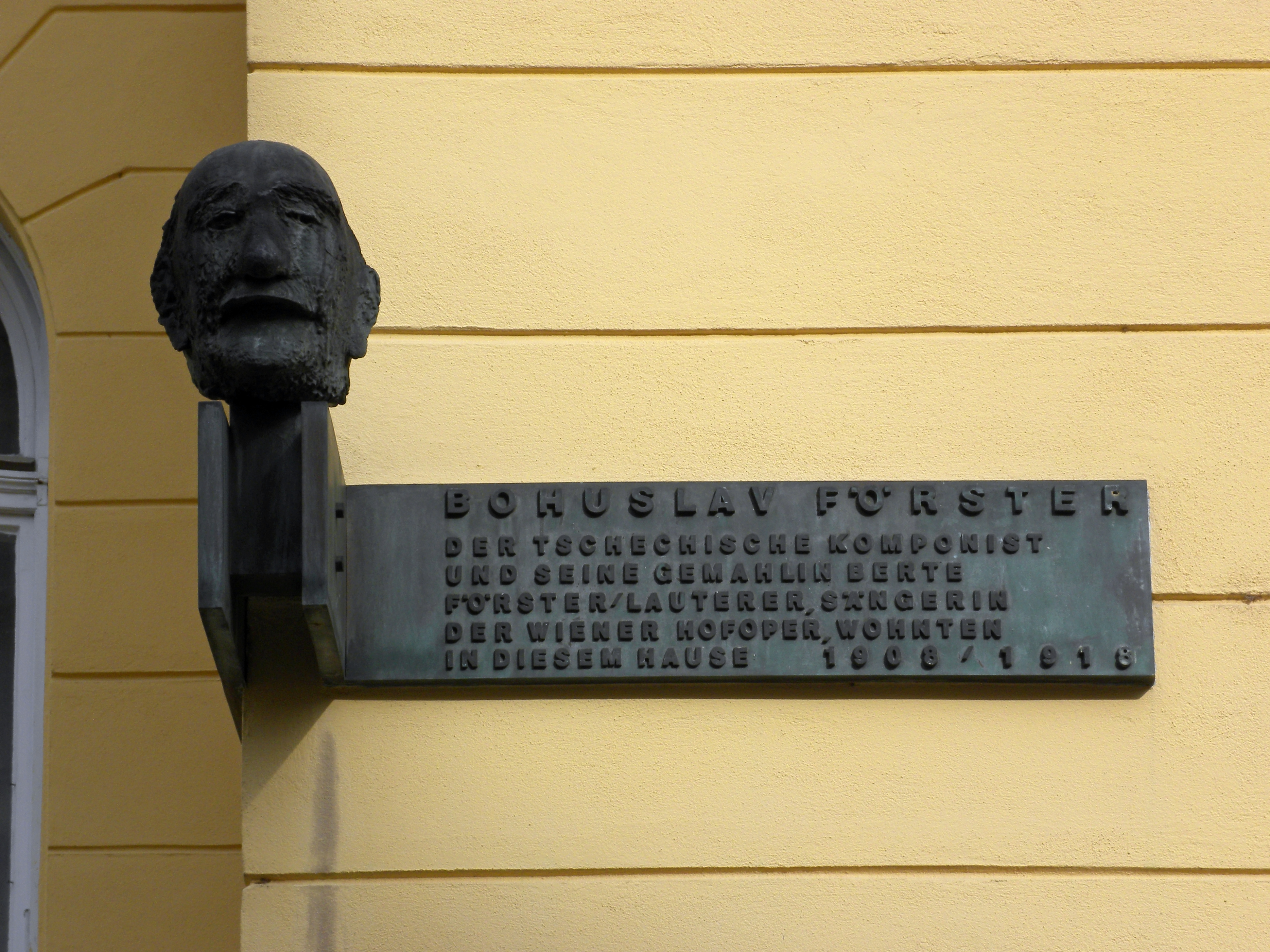 Eine Gedenktafel für Bohuslav Förster am Haus Wattmanngasse 25 in Wien Hietzing